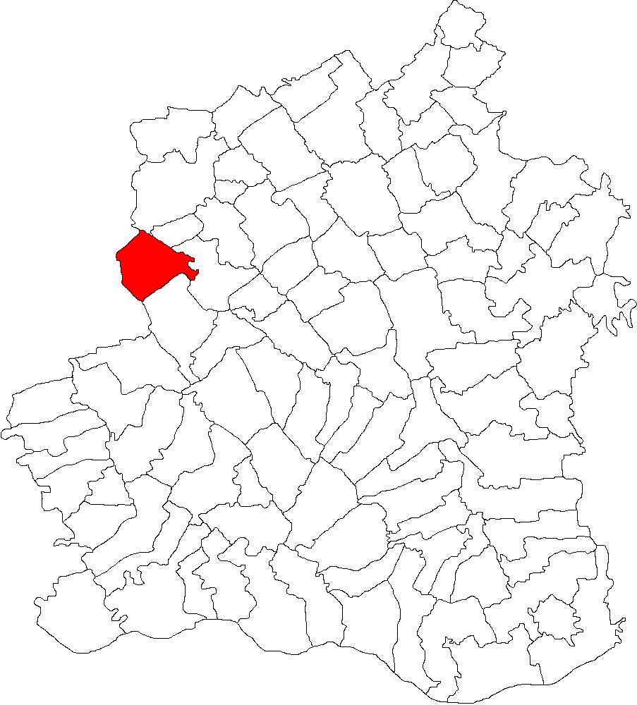 Categorie:Hărţi ale judeţului Teleorman